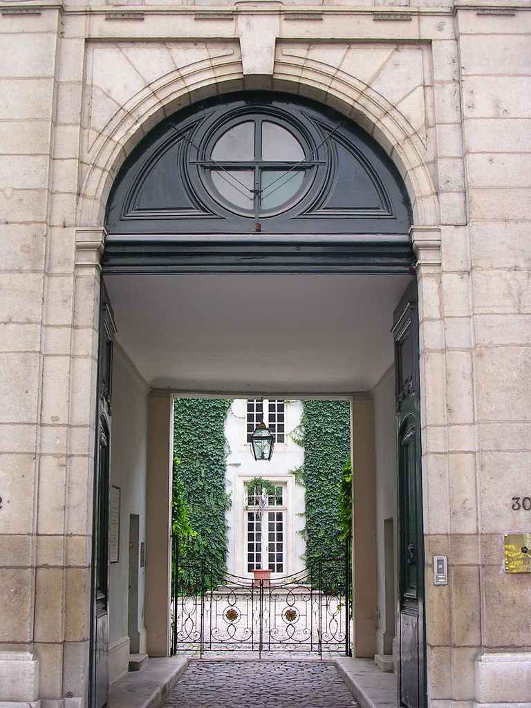 porte-cochère de l'hôtel de Lacroix-Laval à Lyon.